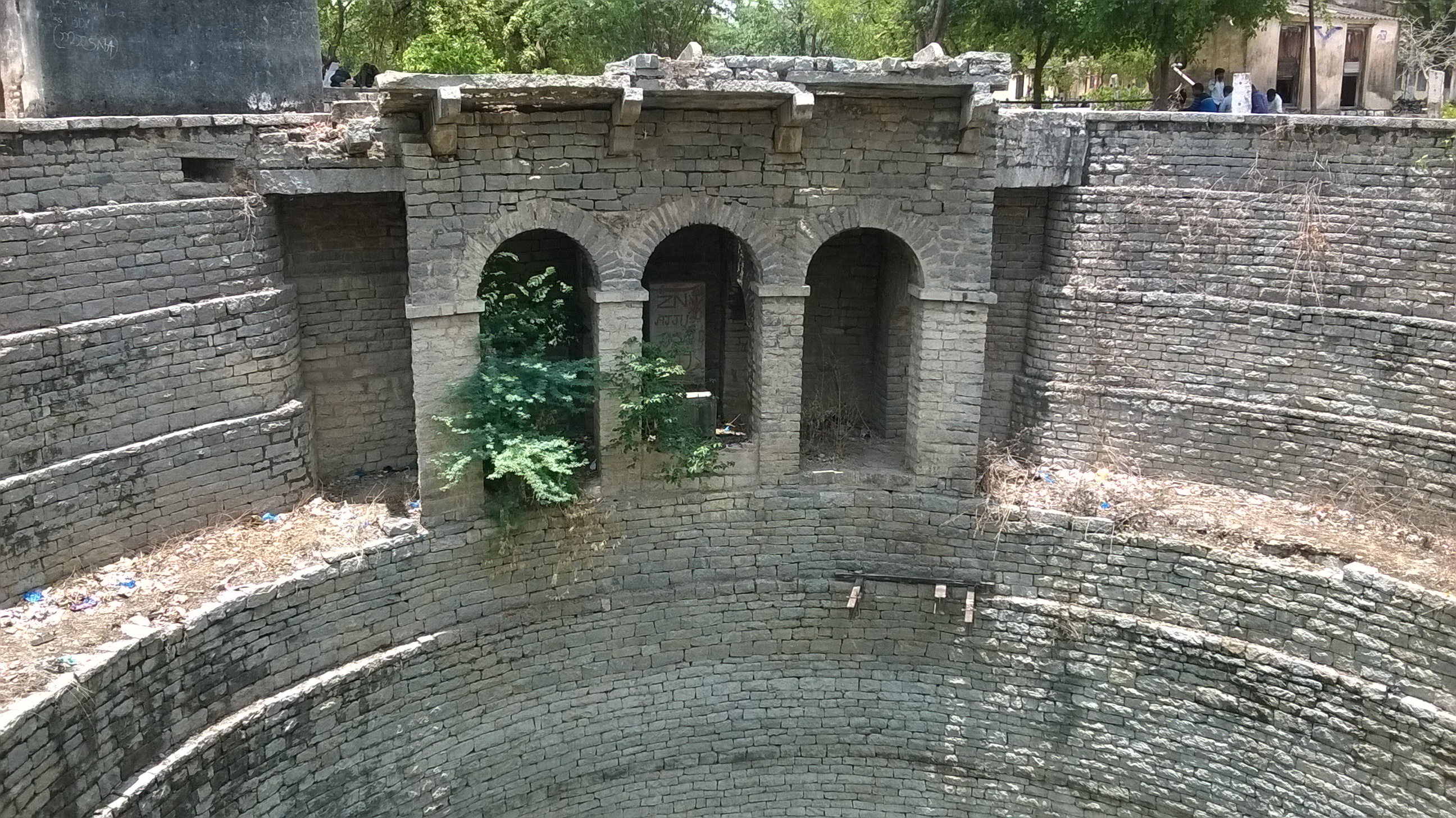 గరుడ పుష్కరిణి